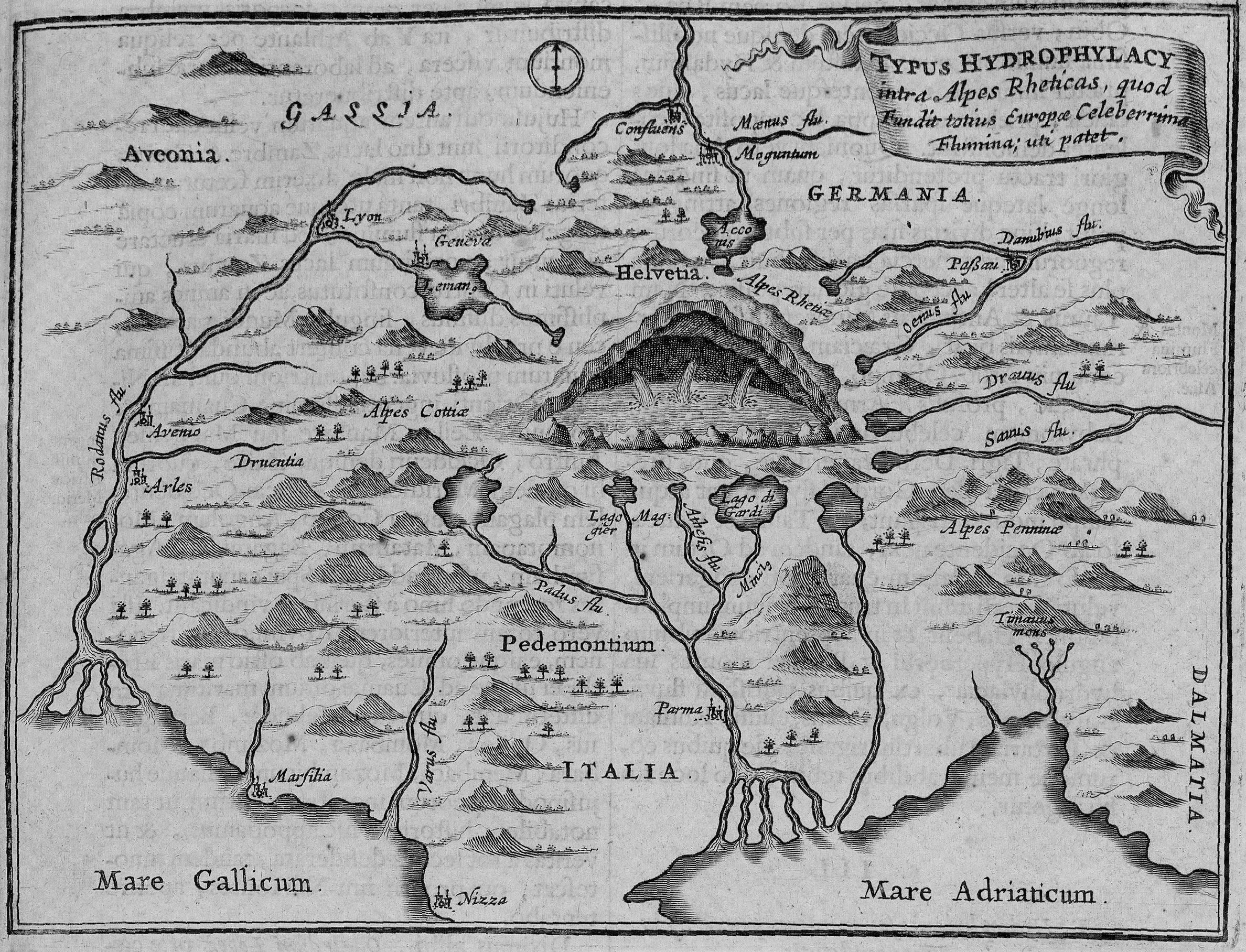 Autor: Kircher, Athanasius,|c(S.I.),1602-1680 Descripción bibliográfica: Athanasii Kircherii e Soc. Iesu Mundi subterranei tomus II: bin V. libros digestus quibus mundi subterranei fructus exponuntur... - Amstelodami :|bapud Joannem Janssonium et Elizeum . - Weyerstraten, 1664 . - [12], 487, [9], [7] h. de grab. y [5] de tablas pleg. : il. ; Fol. - Texto a dos col. con apostillas marginales - Front. calc.: "C. Vande Pas delineavit, A. Siourtsma sculpsit" . - Grabados calc. en interior representaciones de animales, máquinas... Ilustrador: Siourtsma, A., il. Impresor: Jansson, Johann, imp. Impresor: Weyerstraten, Elizeus, imp. Lugar de impresión: Holanda, Amsterdam -Localización: Vea la ilustración en su contexto